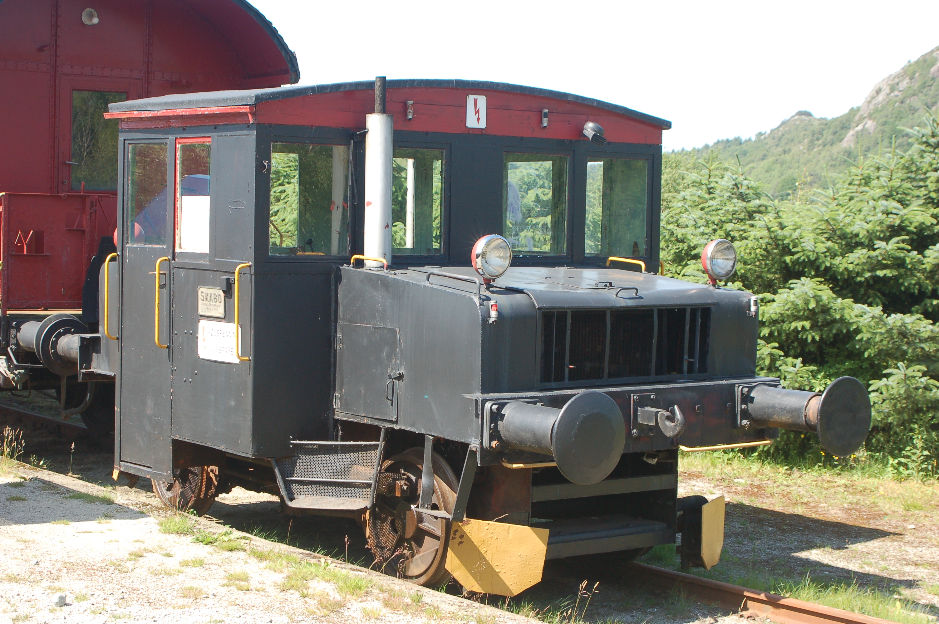 Diesel shunter Skd 206.48 at Figgjo Stasjon, Ålgårdbanen in Norway.